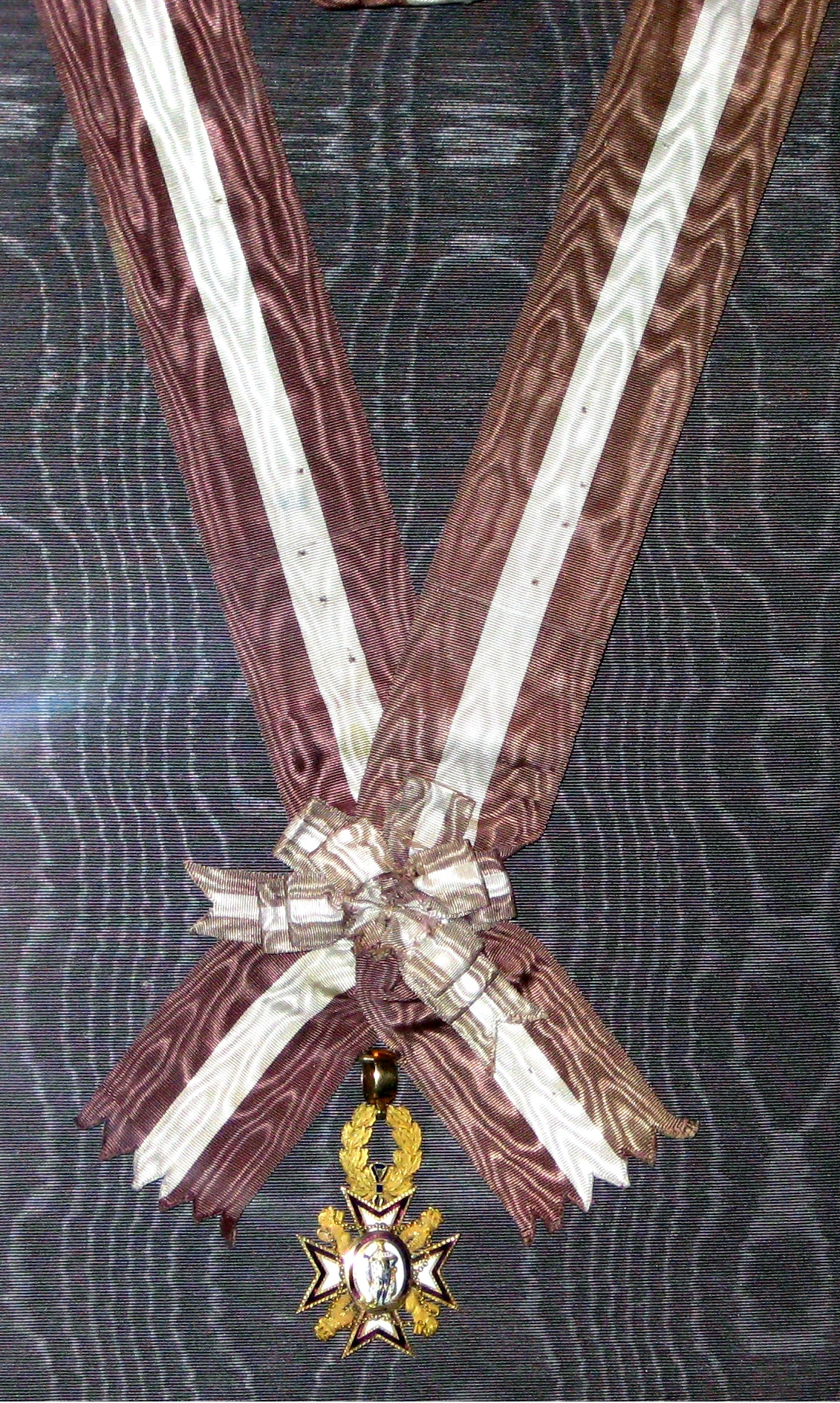 Знак ордена Марии-Луизы с лентой. Принадлежал императрице Марии Александровне. 2-я пол. 19 века